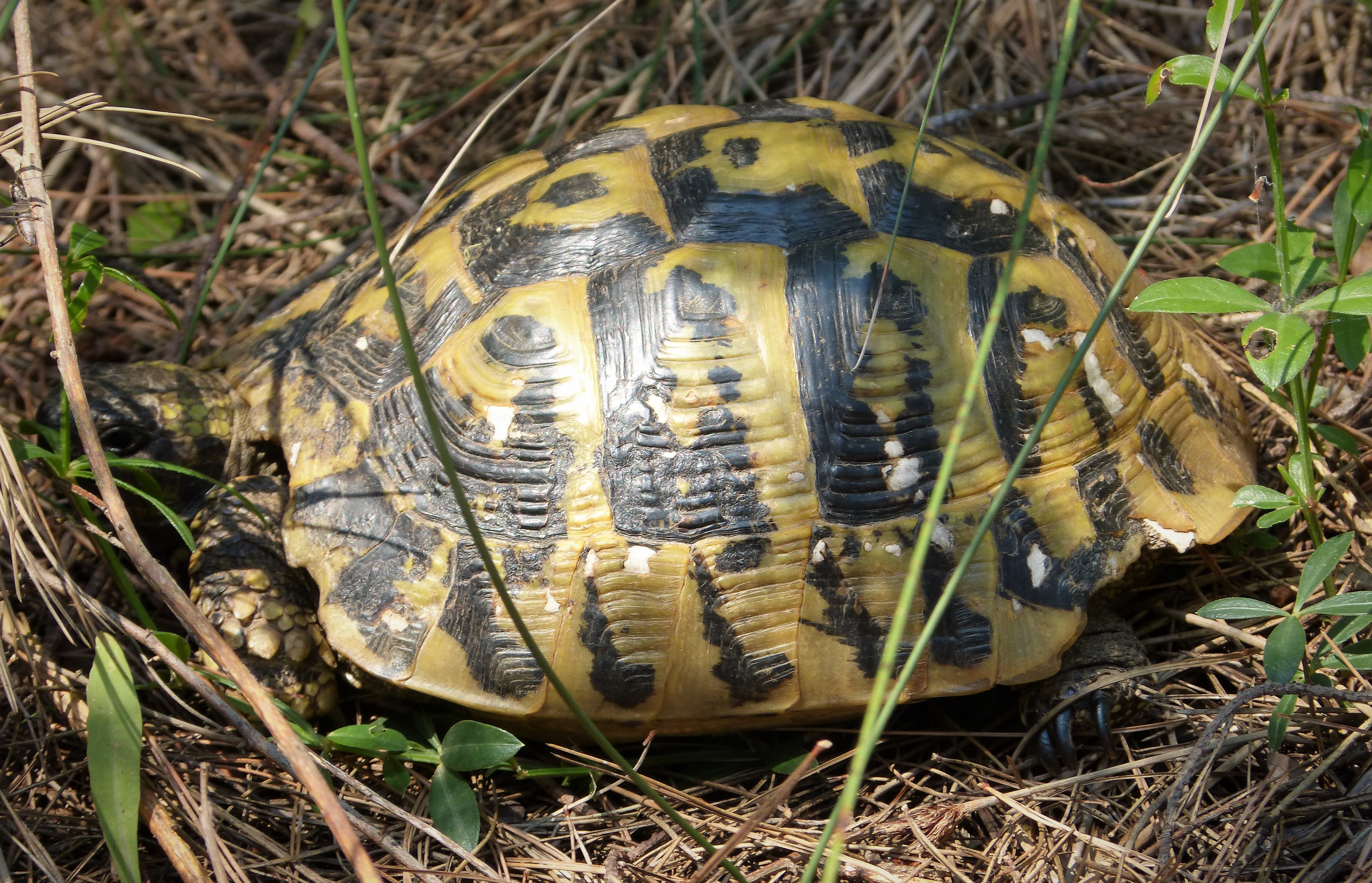 Karavasta National Park. Albania.